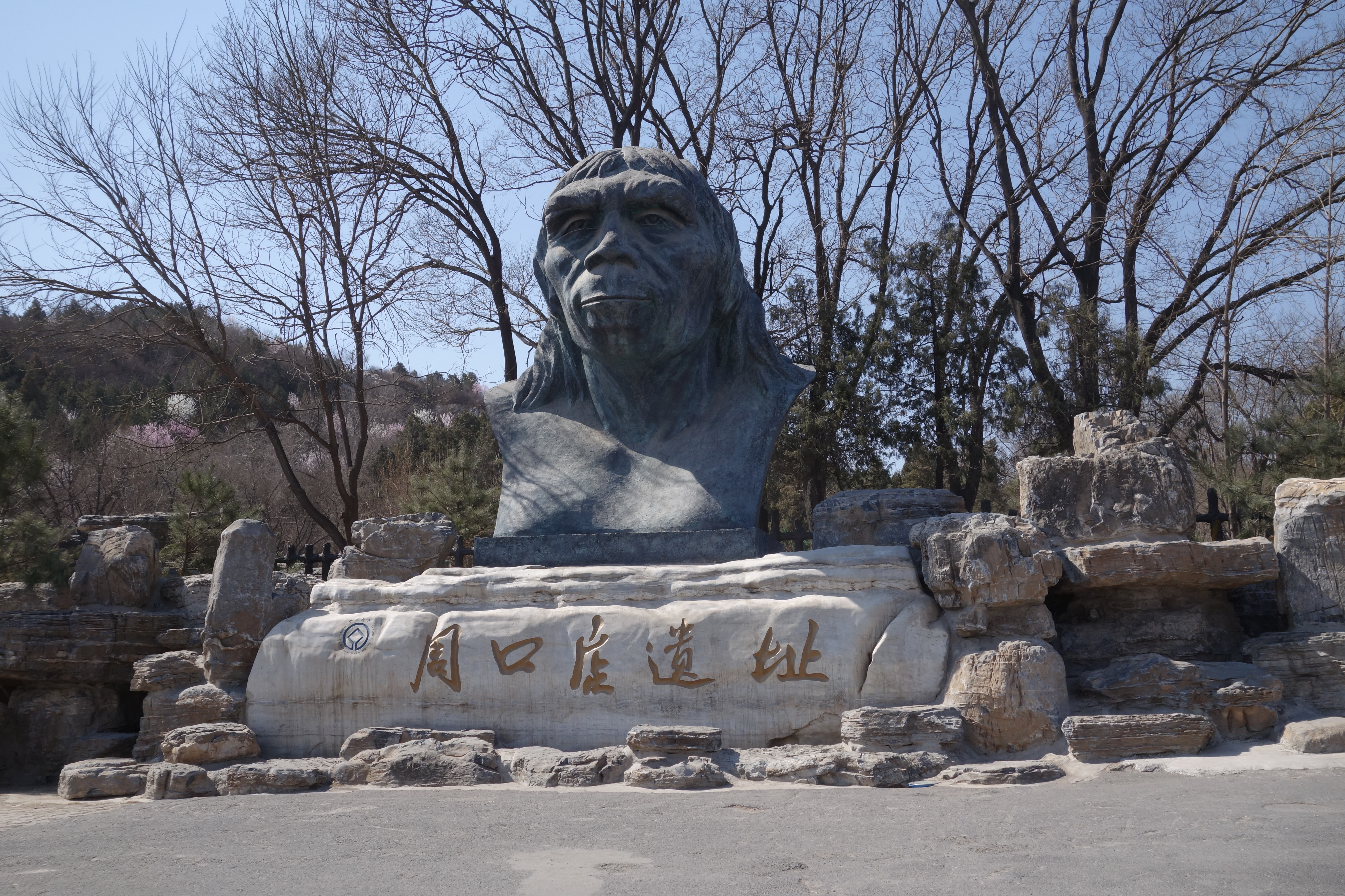 周口店遗址公园入口